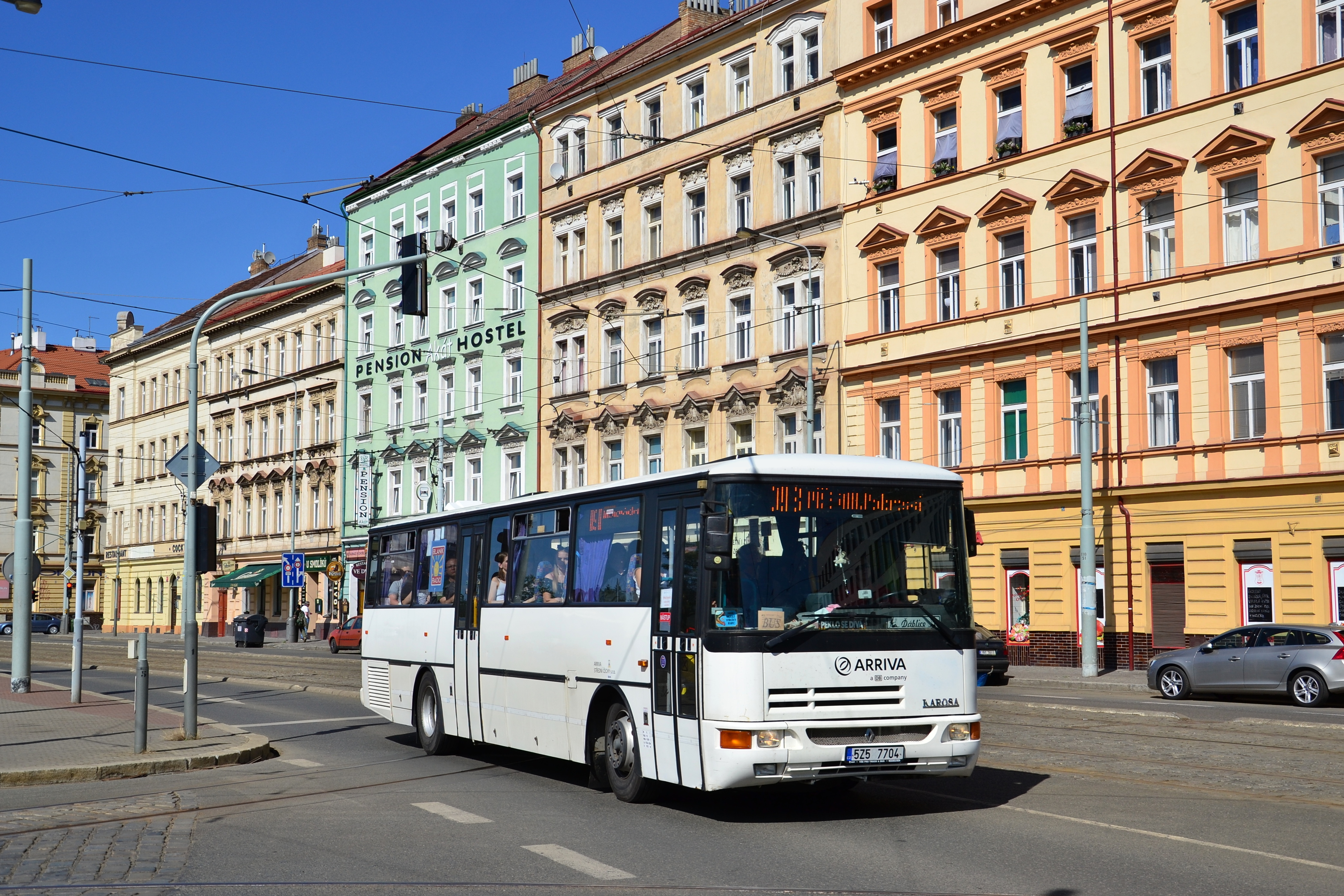 Vůz linky D98 projíždí Smíchovským nádražím